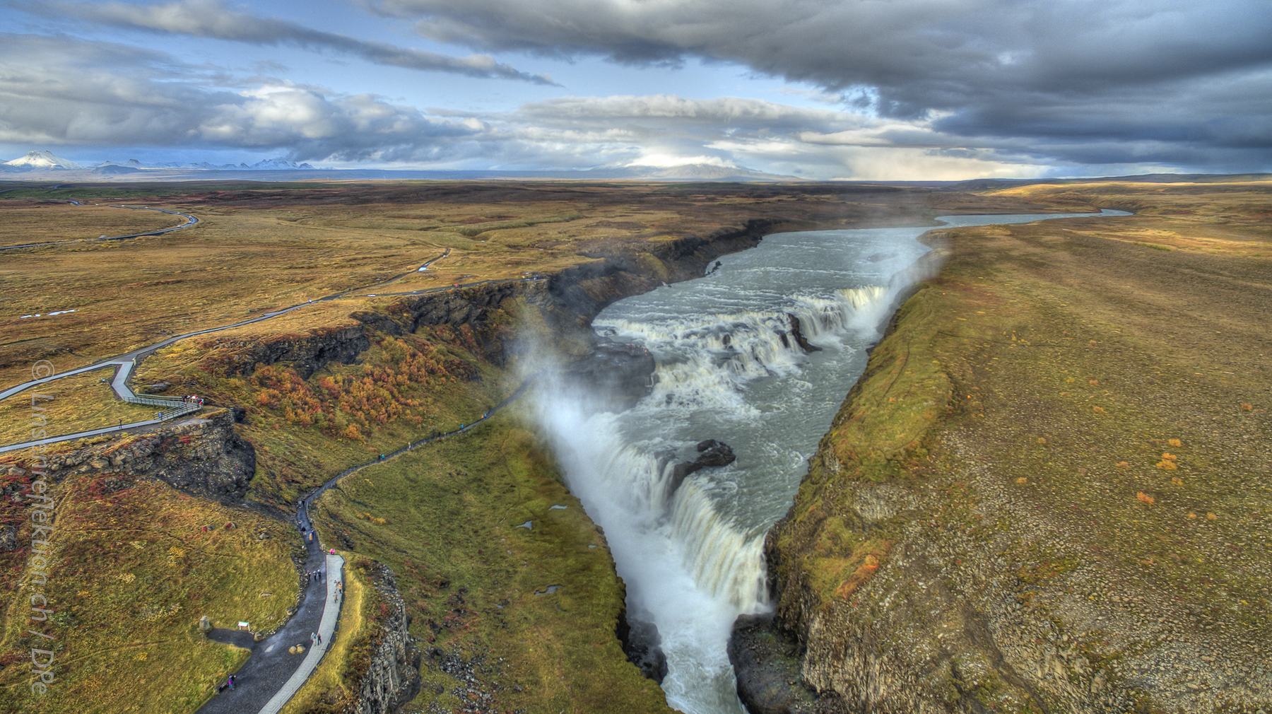 Der Wasserfall Gullfoss, nur wenige Kilometer von Geysir und seinem Strokkur gelegen. Ein HDR Bild von 2015.